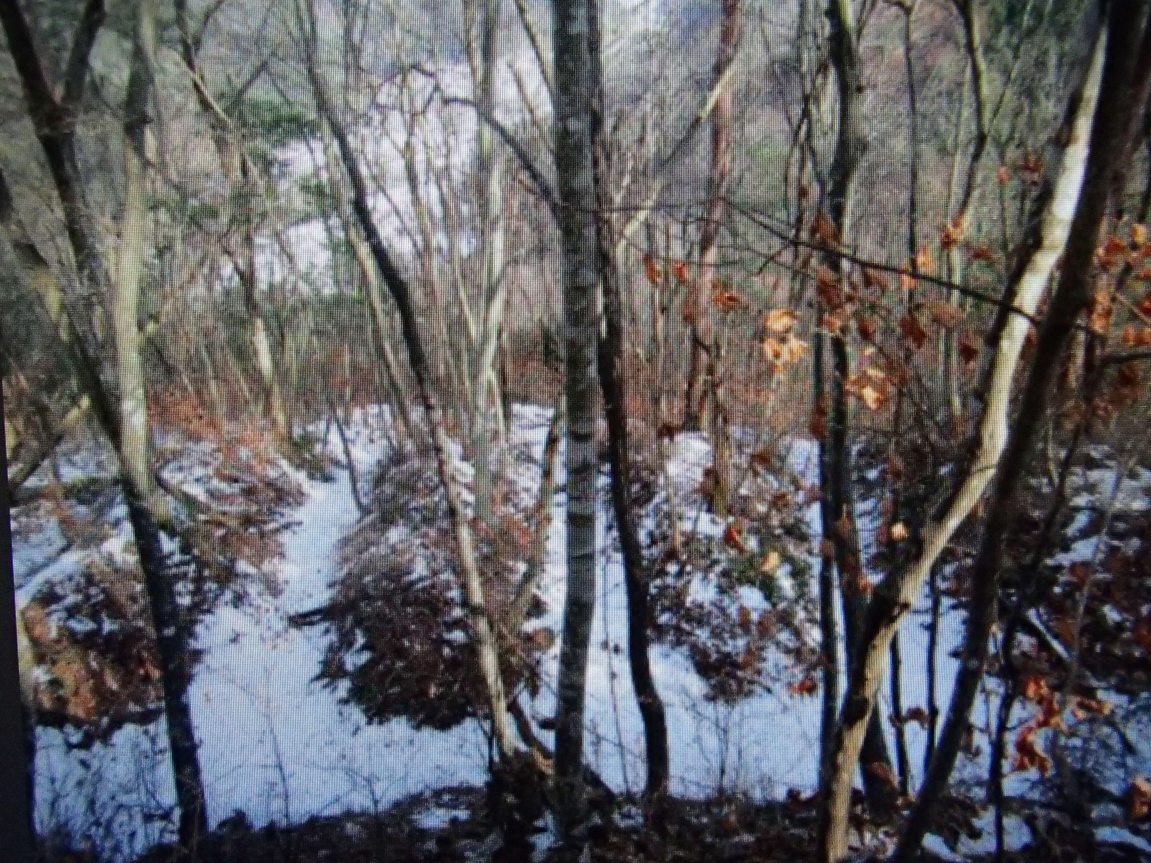 連続空堀に雪が積もった篠脇城